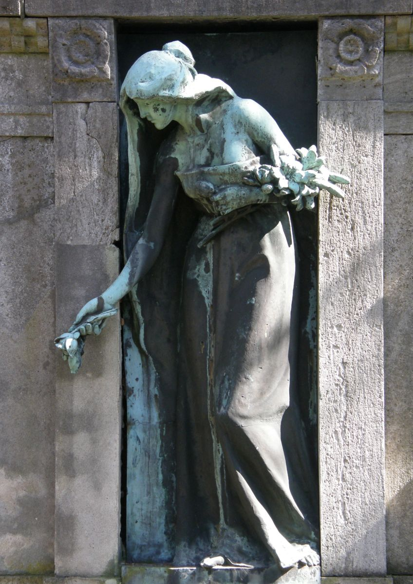 Friedhof Wilmersdorf in Berlin; Trauernde auf dem Grabmal Wislicenus-Finzelberg, geschaffen von Lilli Wislicenus-Finzelberg